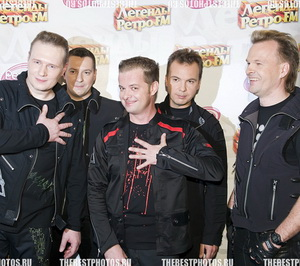 Группа "Технология" на фестивале "Легенды Ретро FM 2009"